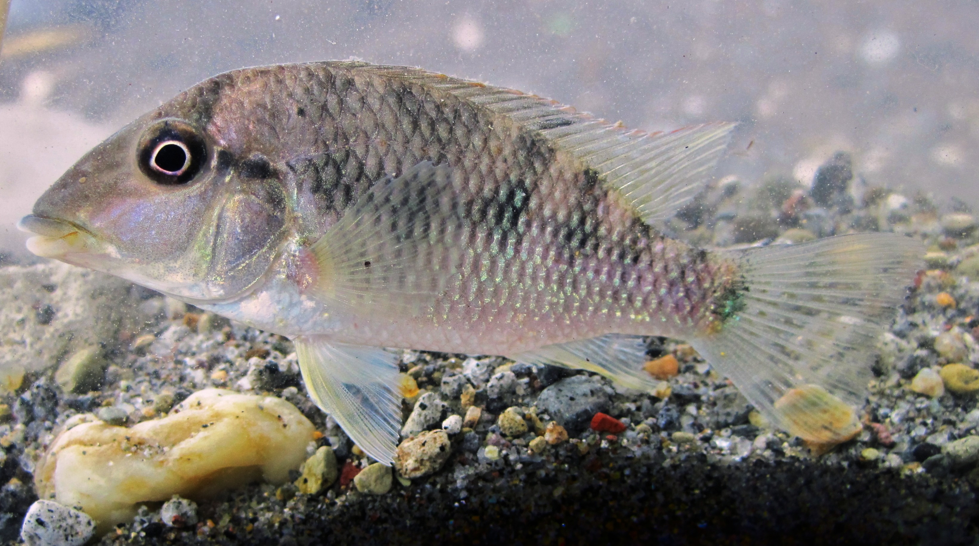 Geophagus steindachneri